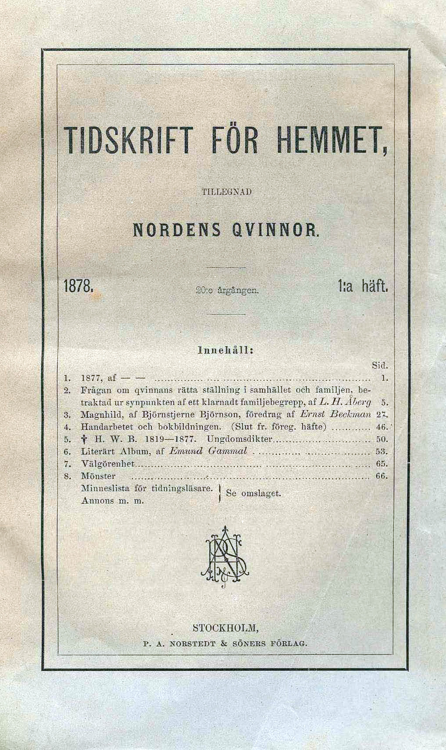 Tidskrift för hemmet, Cover